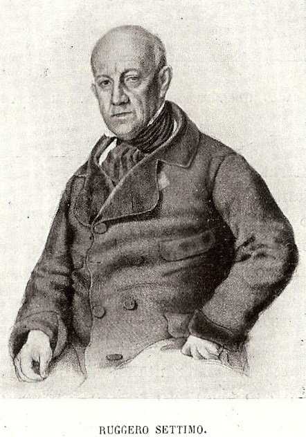 L'immagine si trova nel libro: I liberatori Glorie e figure del Risorgimento di Pasquale de Luca, stampato dall'Istituto Italiano di Arti Grafiche- Editore di Bergamo nel 1909